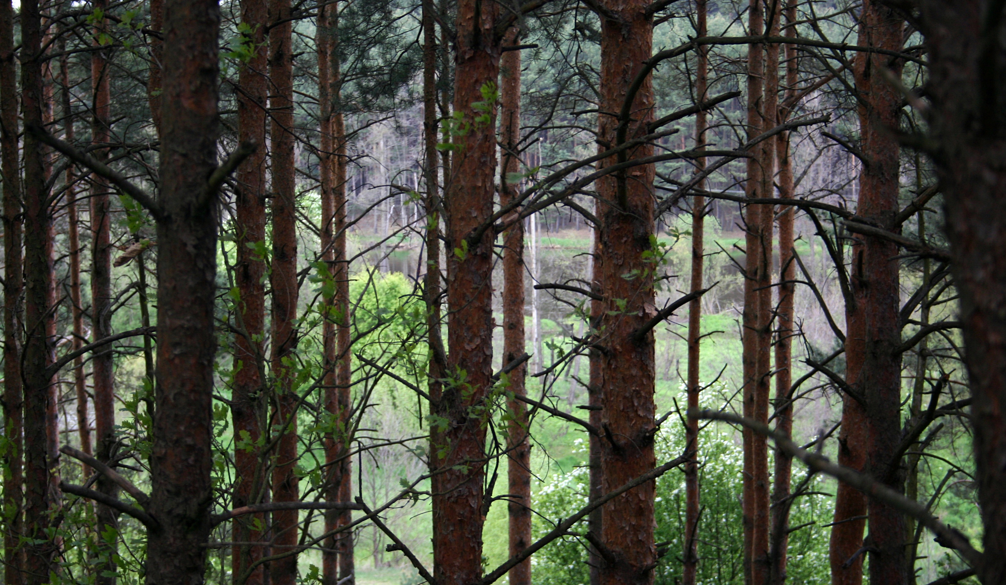 Załęczański Park Krajobrazowy dolina Warty widoczna zza drzew - z góry Wapiennik